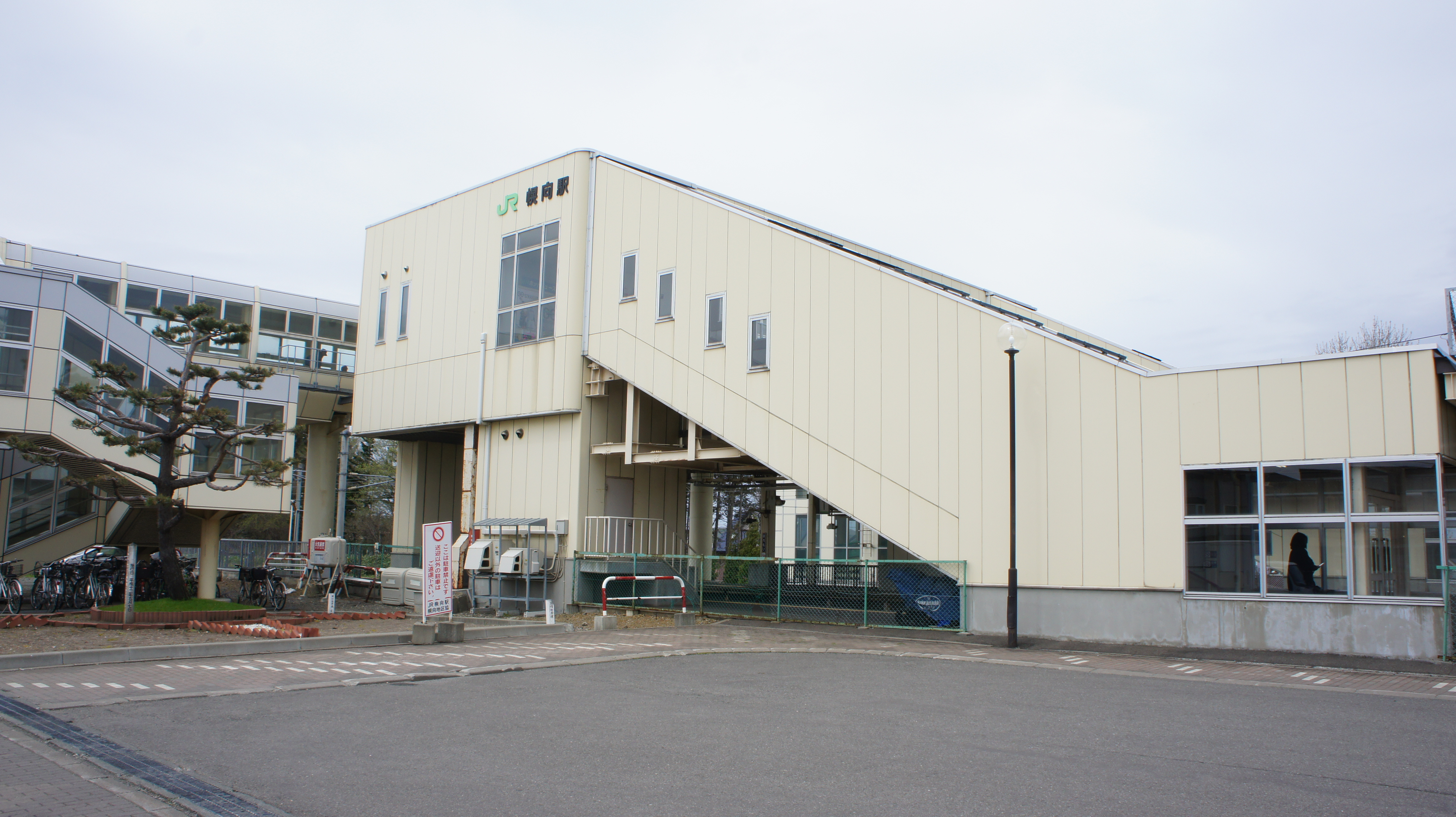 JR函館本線・幌向駅の駅舎 Sony NEX-3